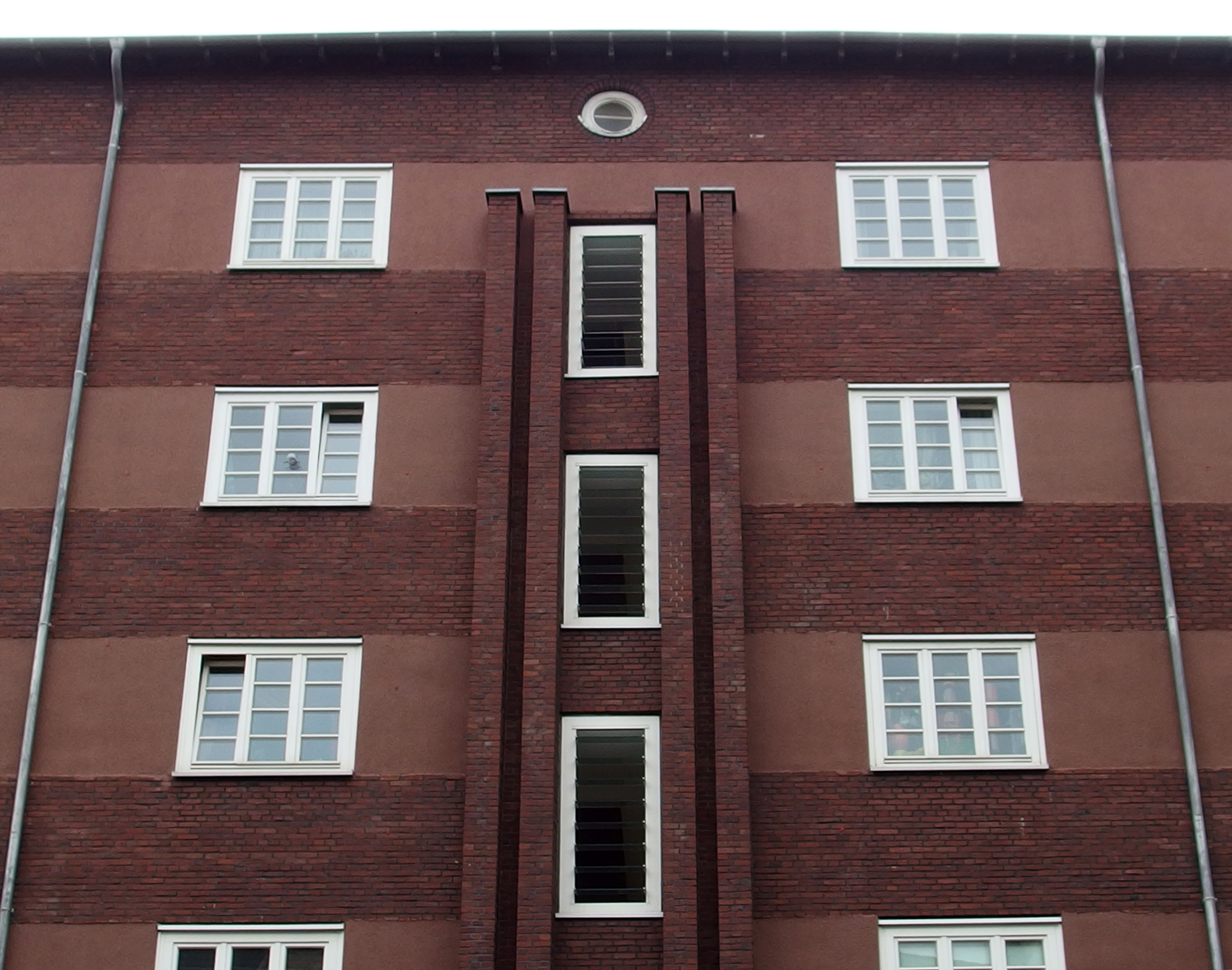 Wohnbebauung Eulerhof in Düsseldorf-Flingern, Fassadenausschnitt an der Lindenstraße